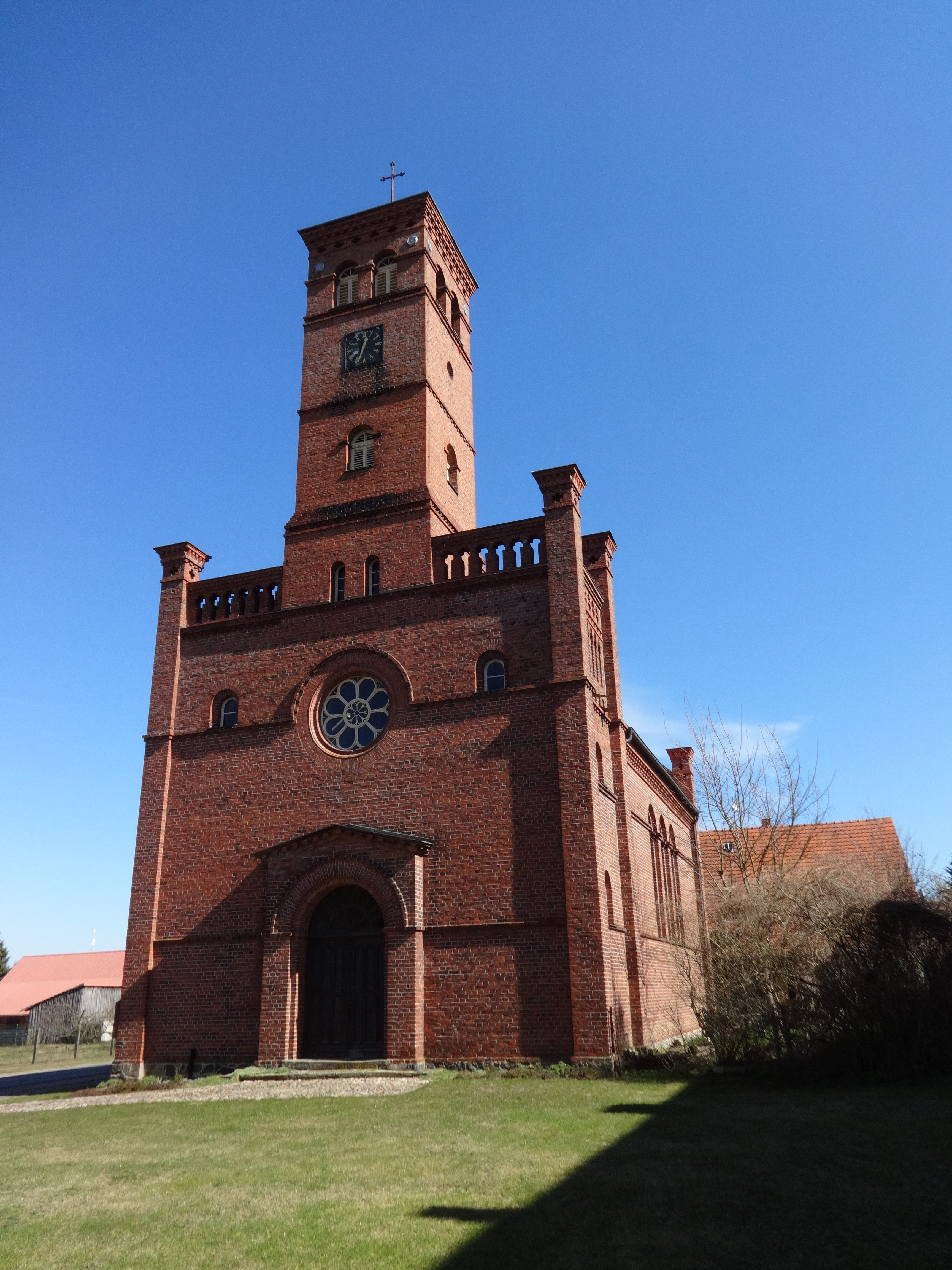 Die Dorfkirche in Christdorf (Wittstock/Dosse) entstand in den Jahren 1835 bis 1837 unter der Leitung von Friedrich August Stüler. In seinem Innern befindet sich eine vollständig erhaltene Ausstattung aus der Bauzeit.